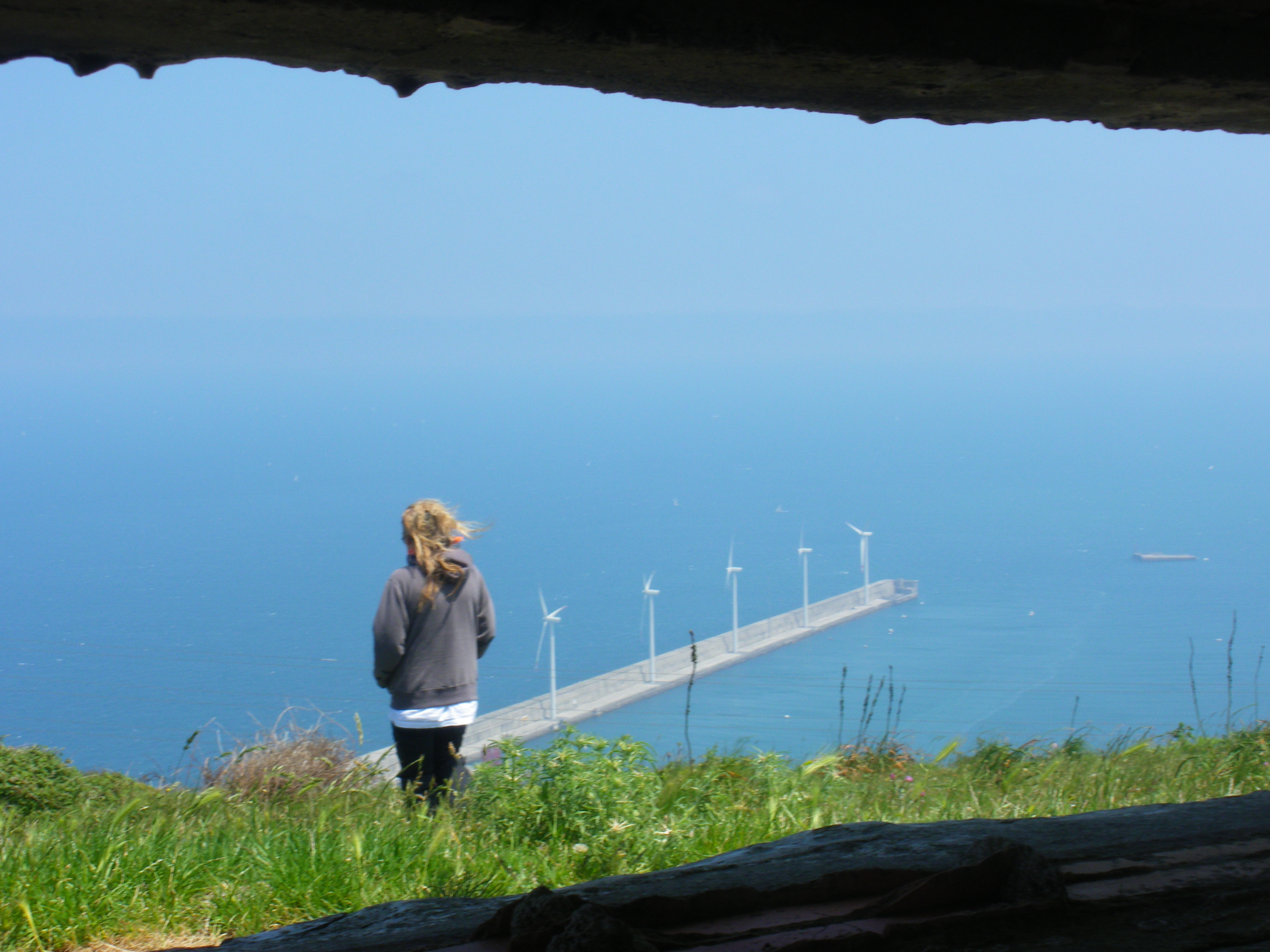 Abrako parke eolikoa, Zierbenan, Punte Lucerotik ikusia.